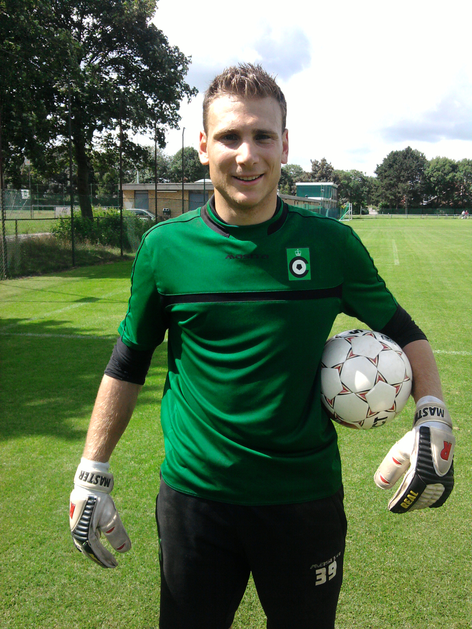 Jo Coppens